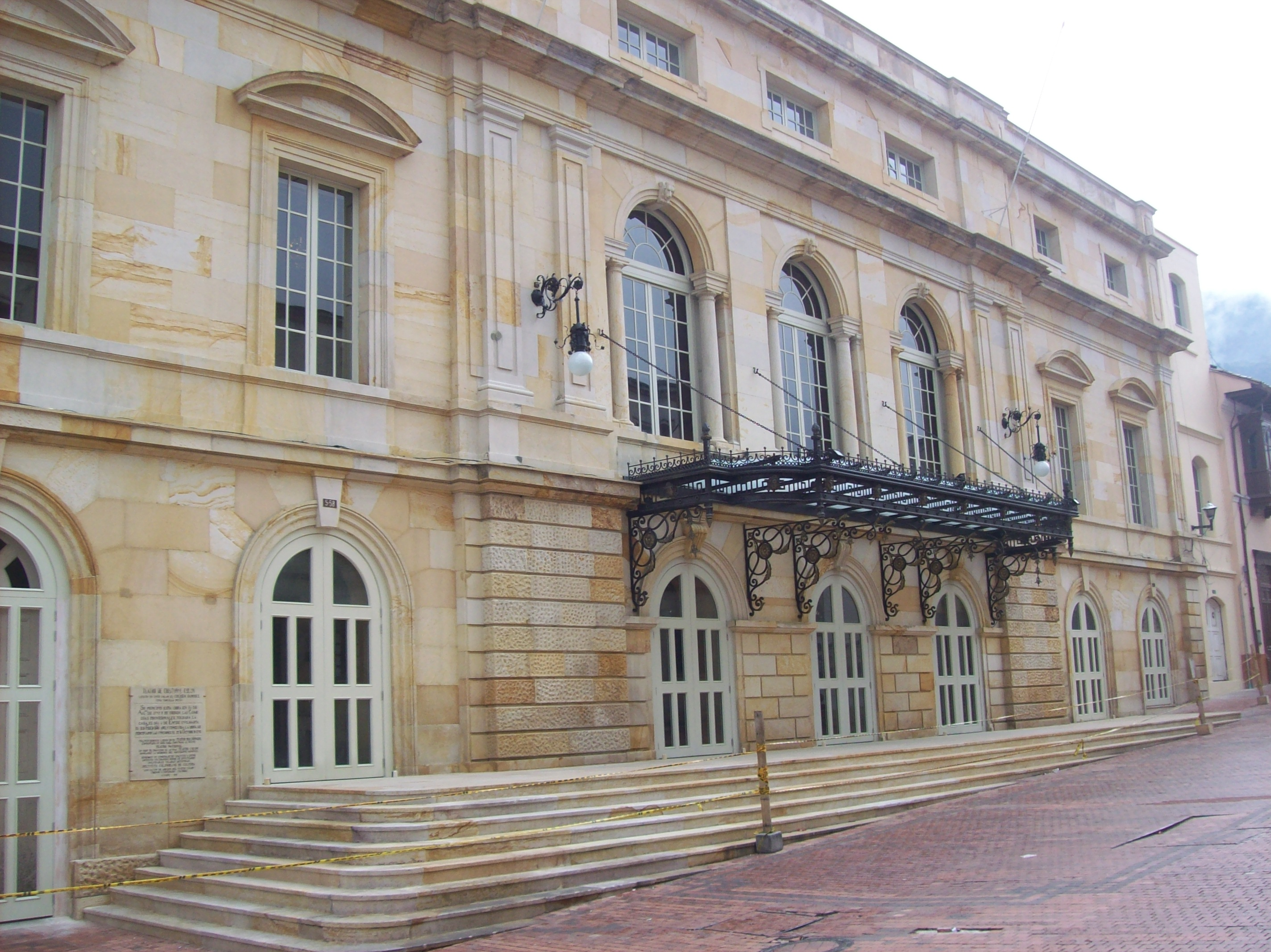 Fachada del Teatro Cristóbal Colón de Bogotá (Colombia) después de la restauración realizada entre 2010 y 2011.